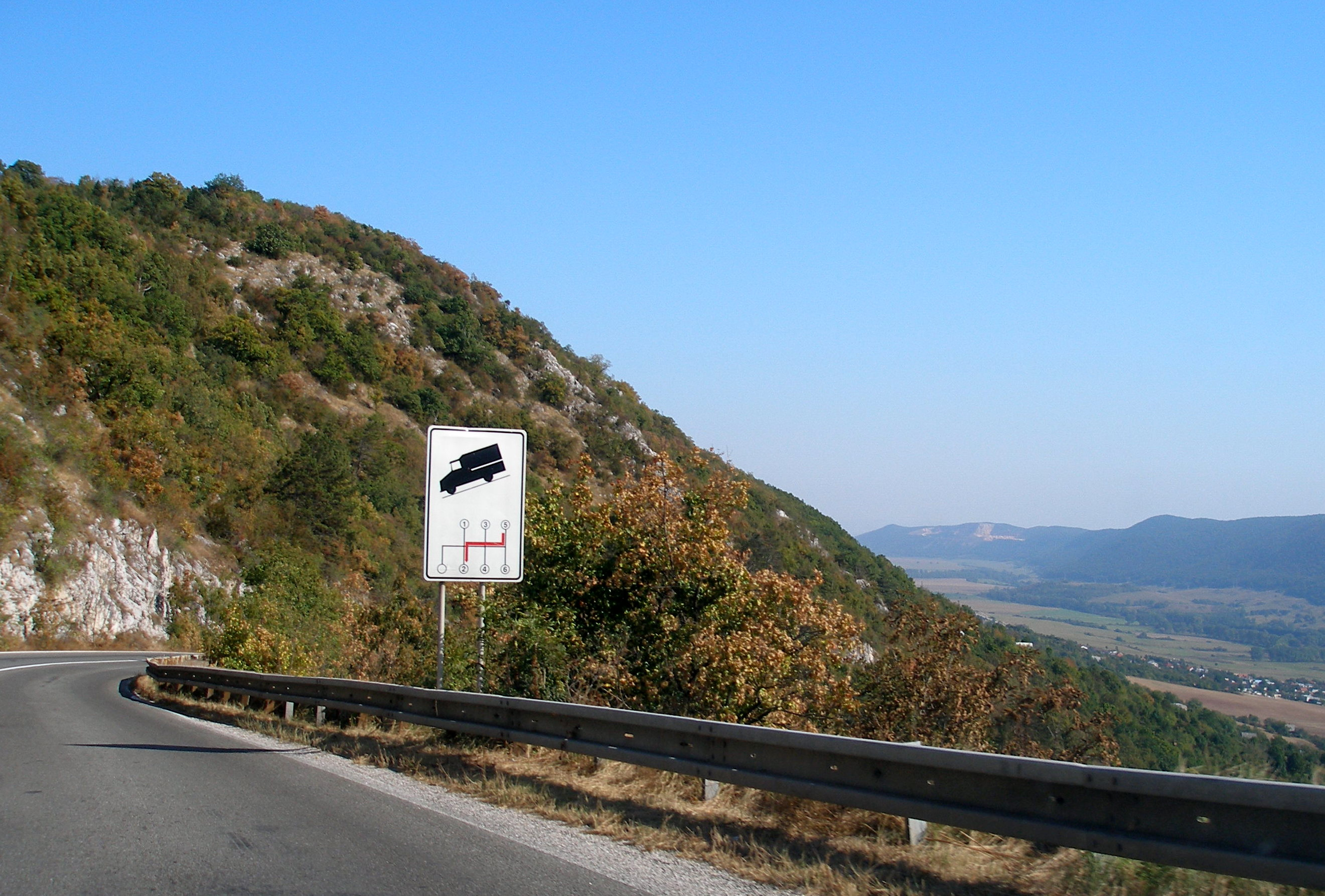 Horský cestný priechod Soroška.